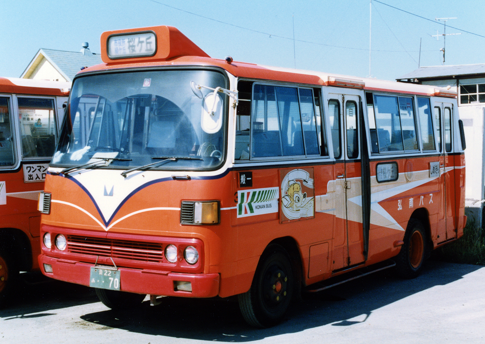 弘南バス 三菱ローザ P-BH214 2ドア仕様